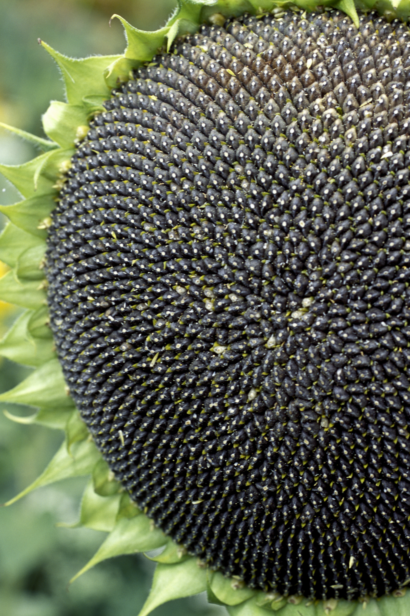 INRA, Jean Weber